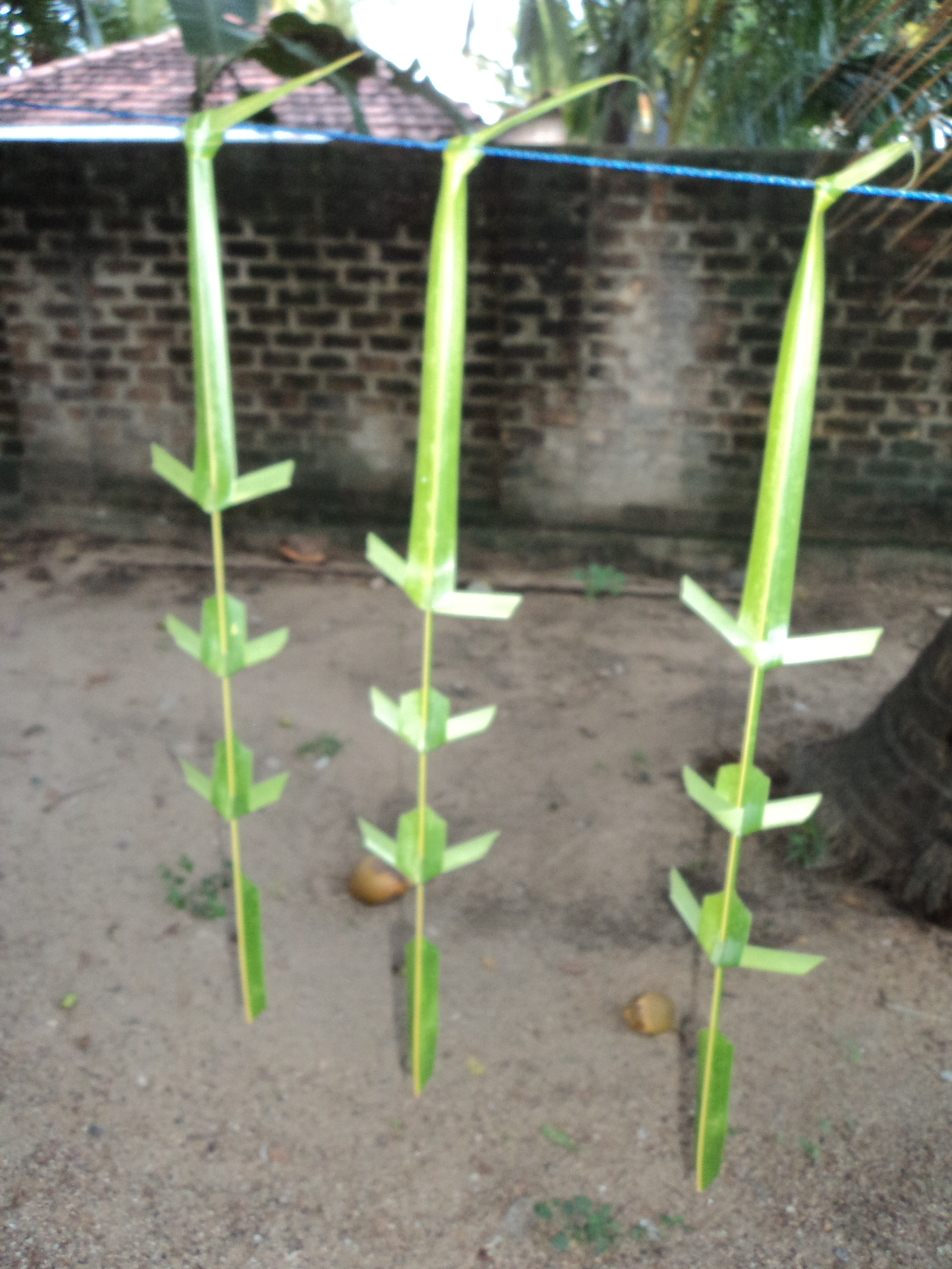 மரணவீடு முதலான அமங்கள நிகழ்வுகளில் கட்டுவது அமங்கள தோரணம்